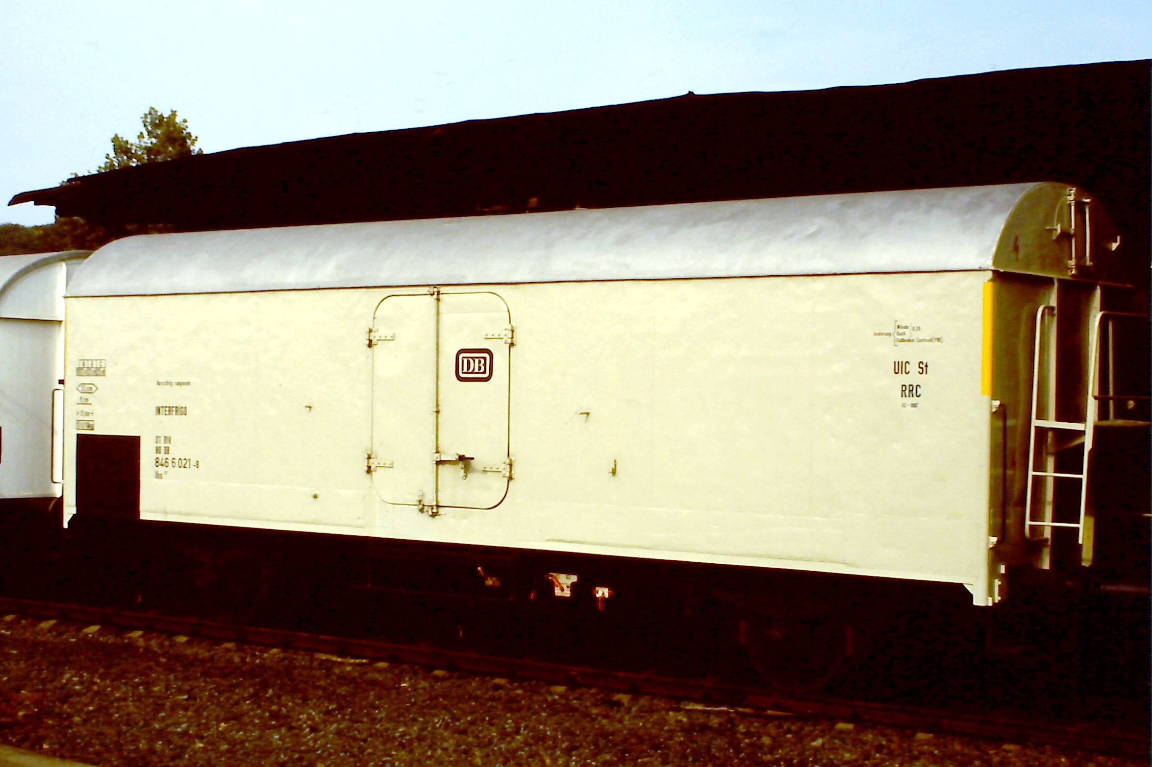 Kühlwagen der Gattung Ibs377 von Interfrigeo bei der DB eingestellt, ausgestellt in der Fahrzeugschau 150 Jahre deutsche Eisenbahn in Bochum-Dahlhausen